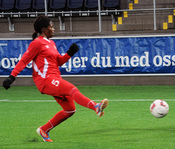 a_25_0238